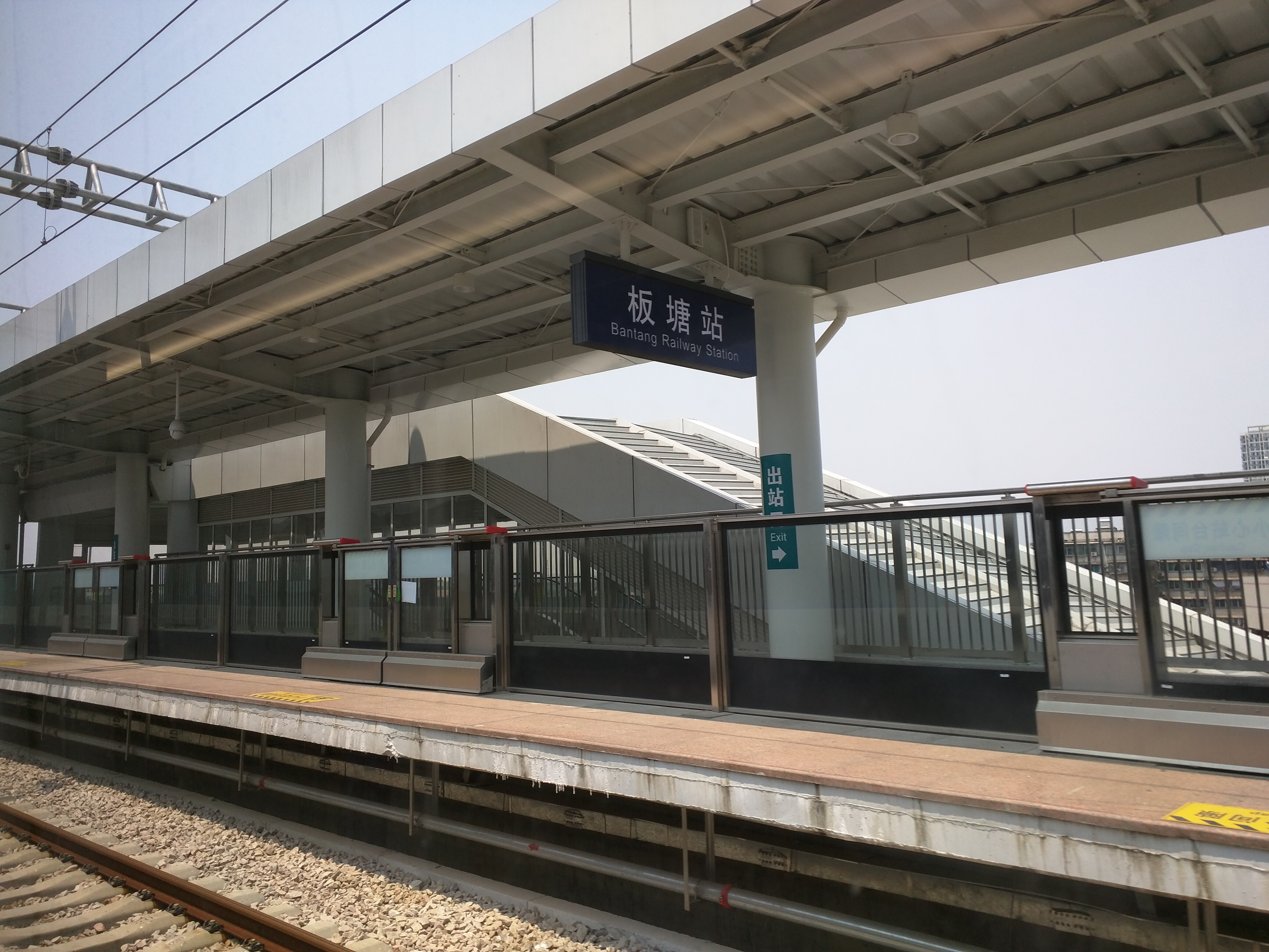 中文（中国大陆）: 长株潭城际铁路板塘站1站台